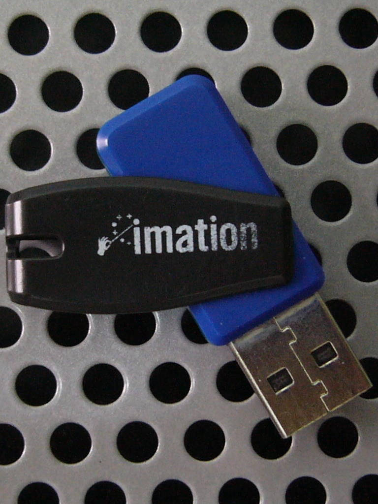 臺灣土地銀行贈送的Imation Nano Flash Drive 2GB背面